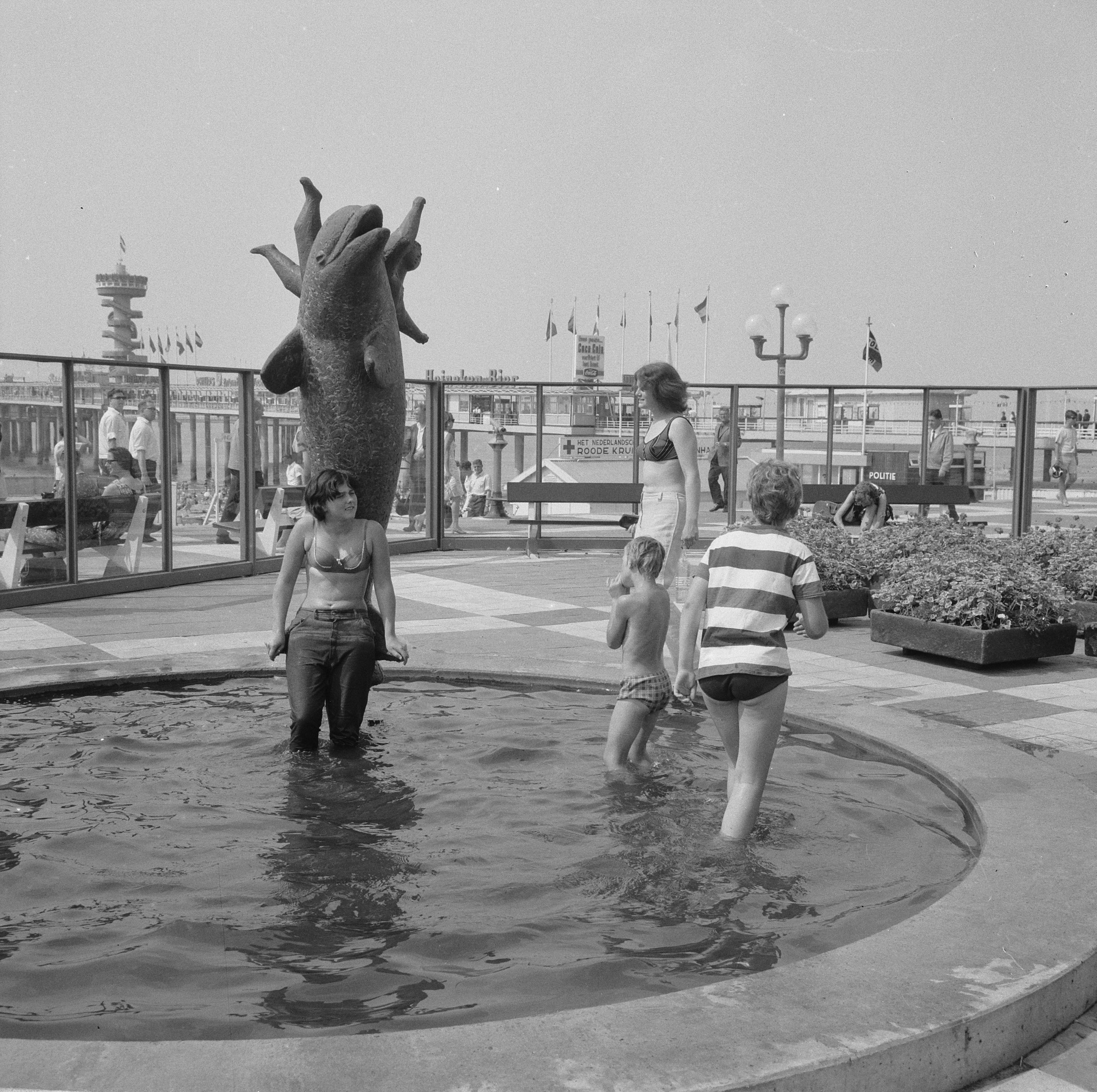 Collectie / Archief : Fotocollectie Anefo Reportage / Serie : [ onbekend ] Beschrijving : Flipper op boulevard Scheveningen Datum : 10 juni 1966 Locatie : Scheveningen, Zuid-Holland Trefwoorden : boulevards Fotograaf : Nijs, Jac. de / Anefo Auteursrechthebbende : Nationaal Archief Materiaalsoort : Negatief (zwart/wit) Nummer archiefinventaris : bekijk toegang 2.24.01.03 Bestanddeelnummer : 919-2393